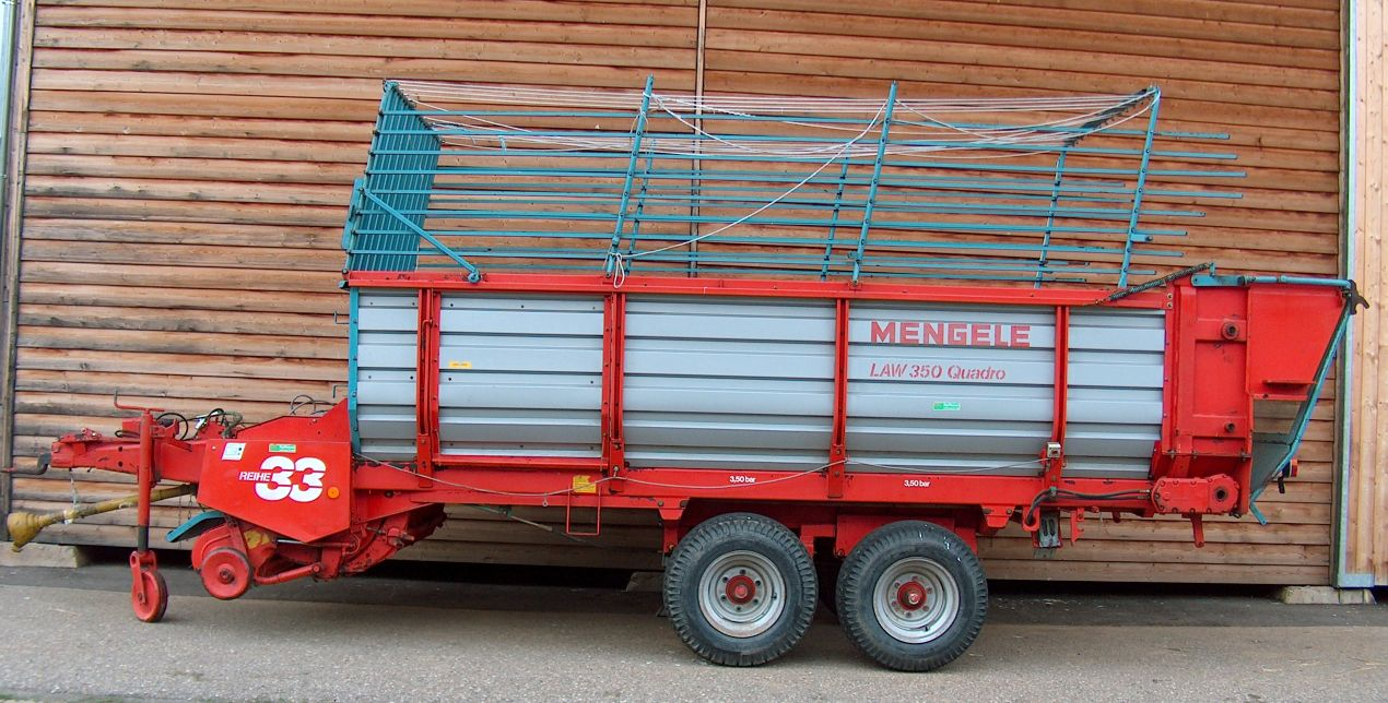 Ladewagen LAW 350 Quadro des Herstellers Mengele